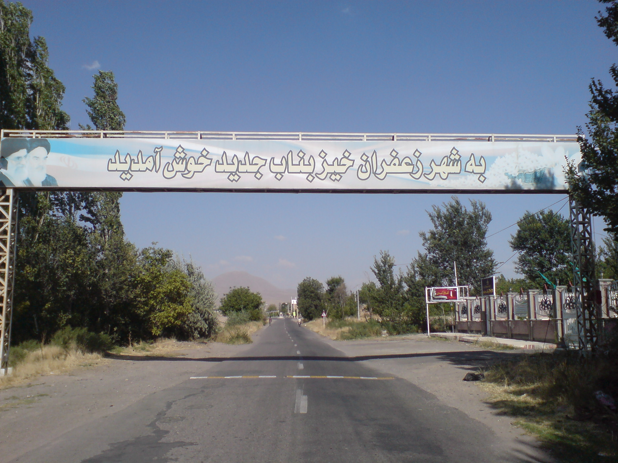 تابلو ورودی شهر بناب